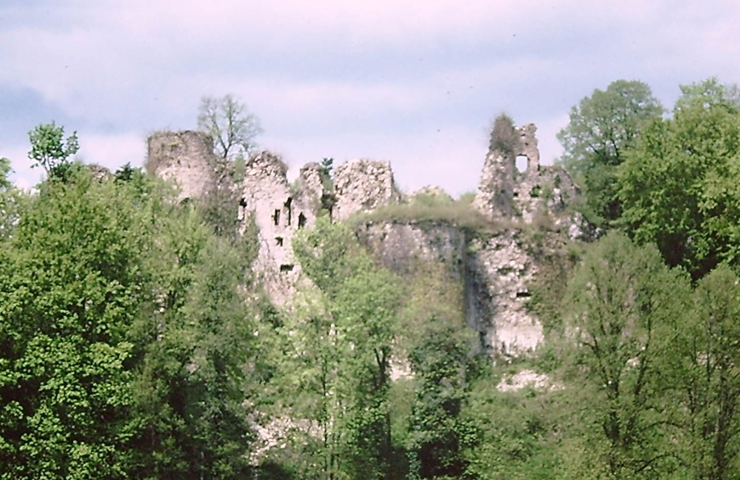 Vue générale en 1976